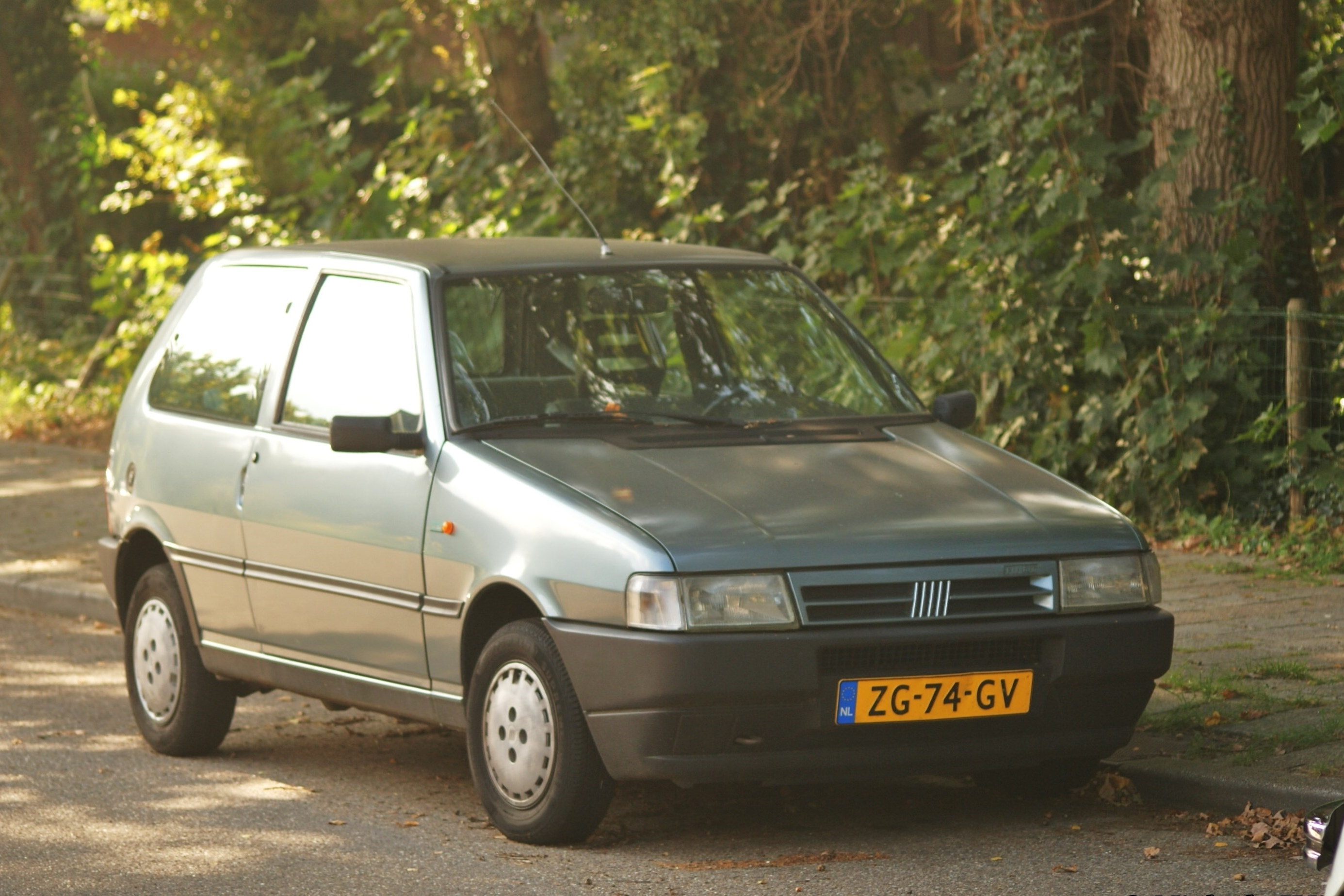 ZG-74-GV